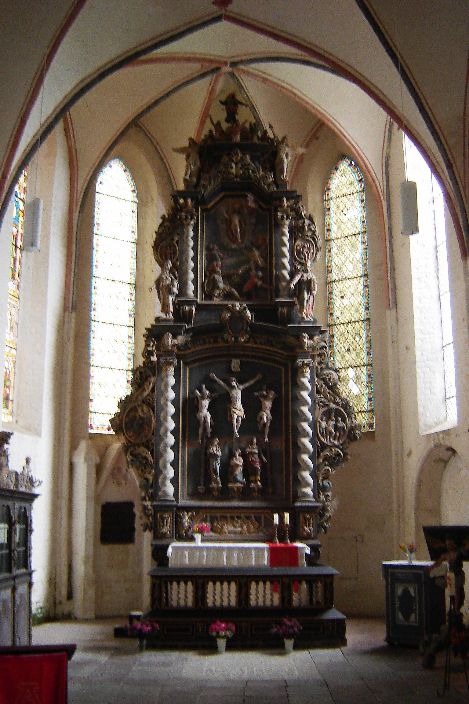 Altar der Kirche in Groß Mohrdorf